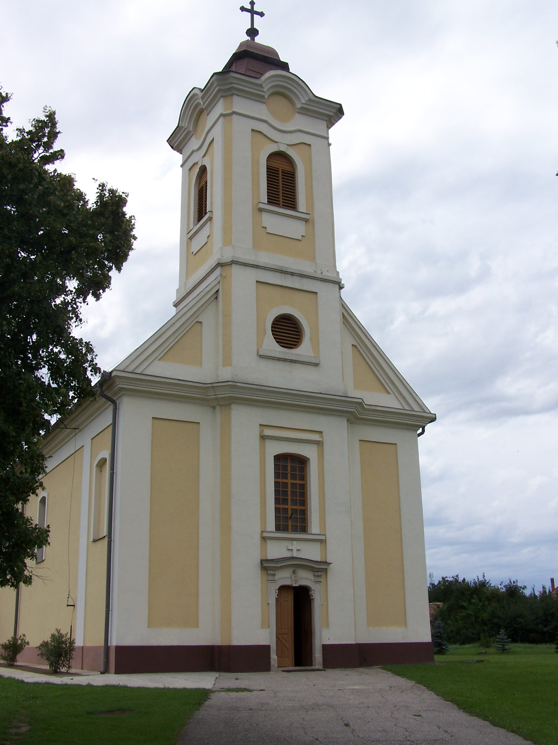 Római katolikus templom (Szent Péter és Pál) (Palotás, Szabadság utca 28.) This is a photo of a monument in Hungary, Identifier: 6753